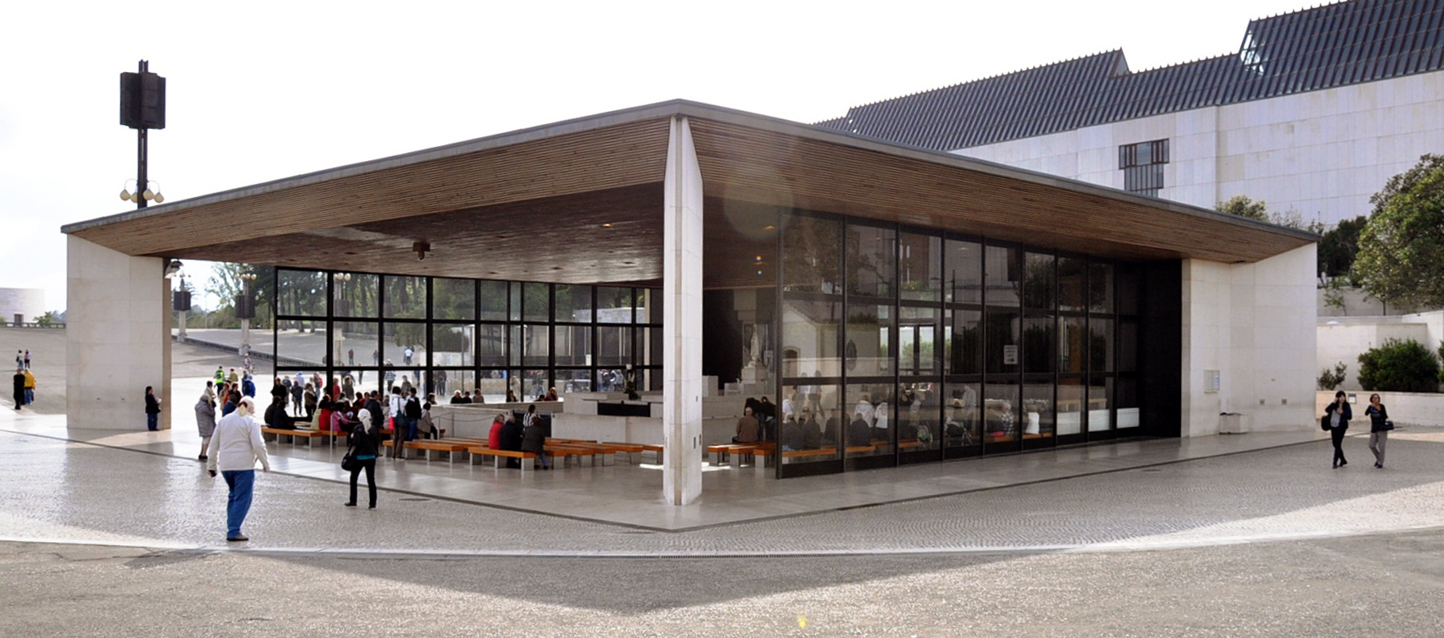 Das an der Erscheinungsstelle errichtete Kapellchen